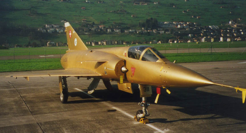 Mirage IIIS Gold